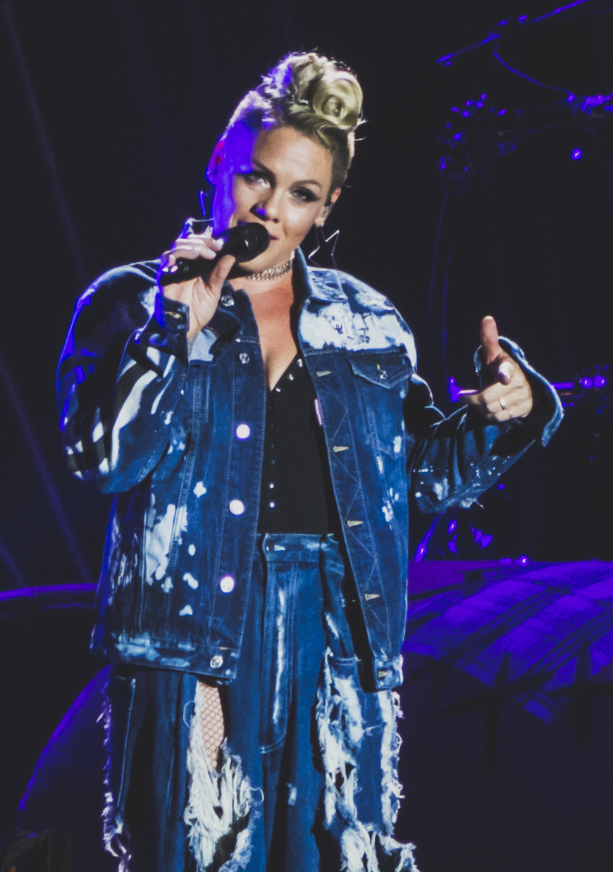 PinkVFest190817-35